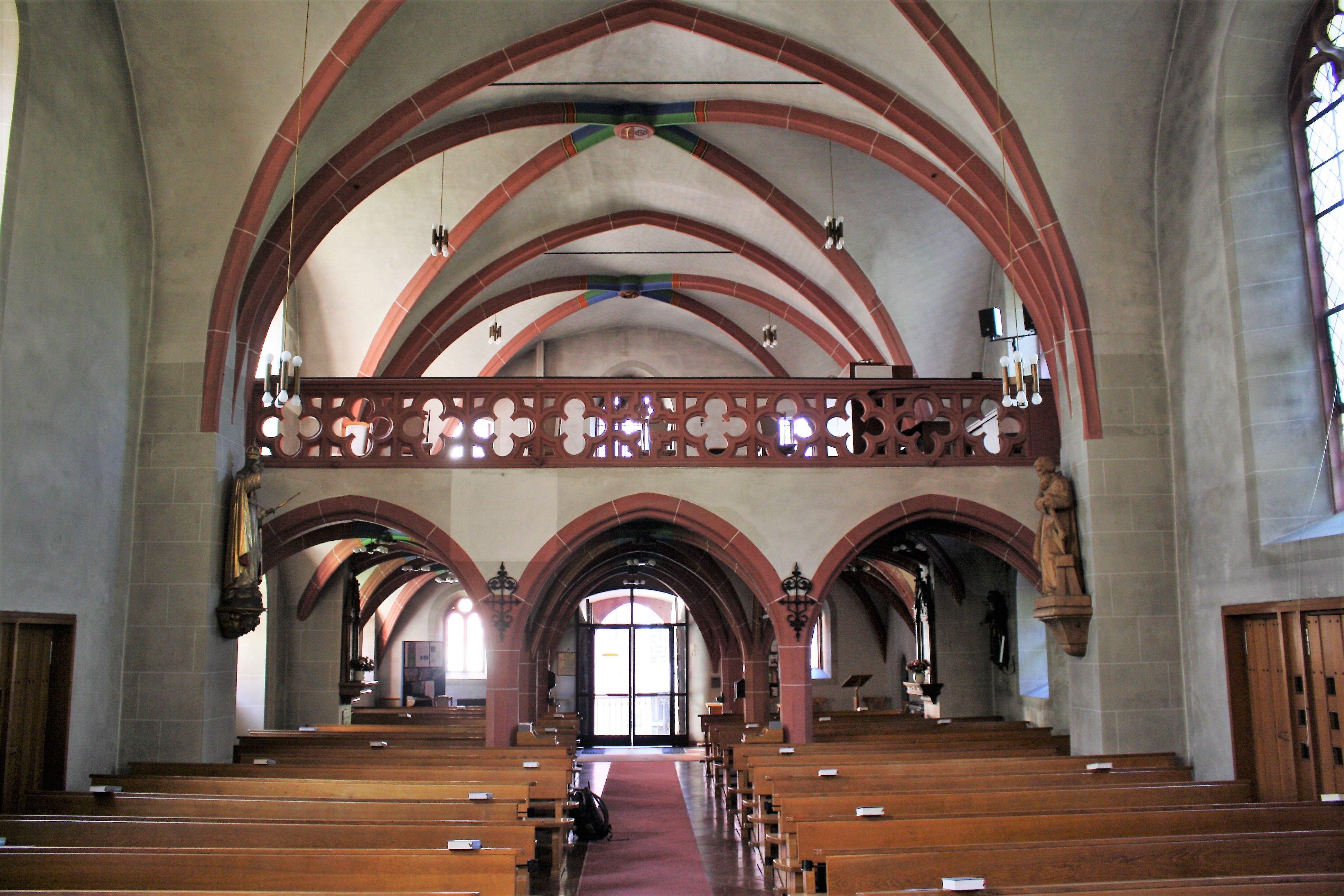 Empore in der Heilig Kreuz Kirche in Assmannshausen (Rüdesheim)